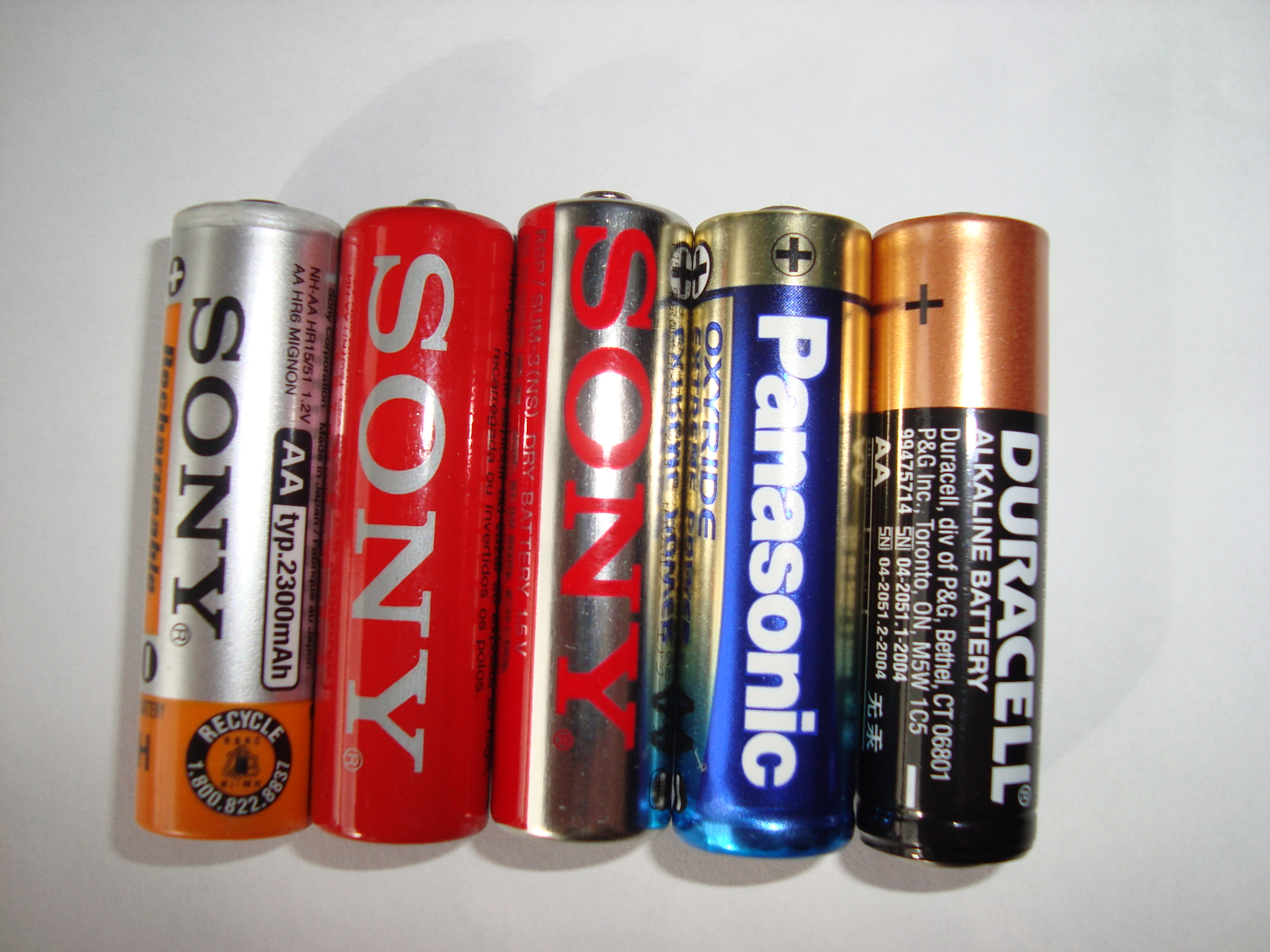 Algumas pilhas (baterias) AA